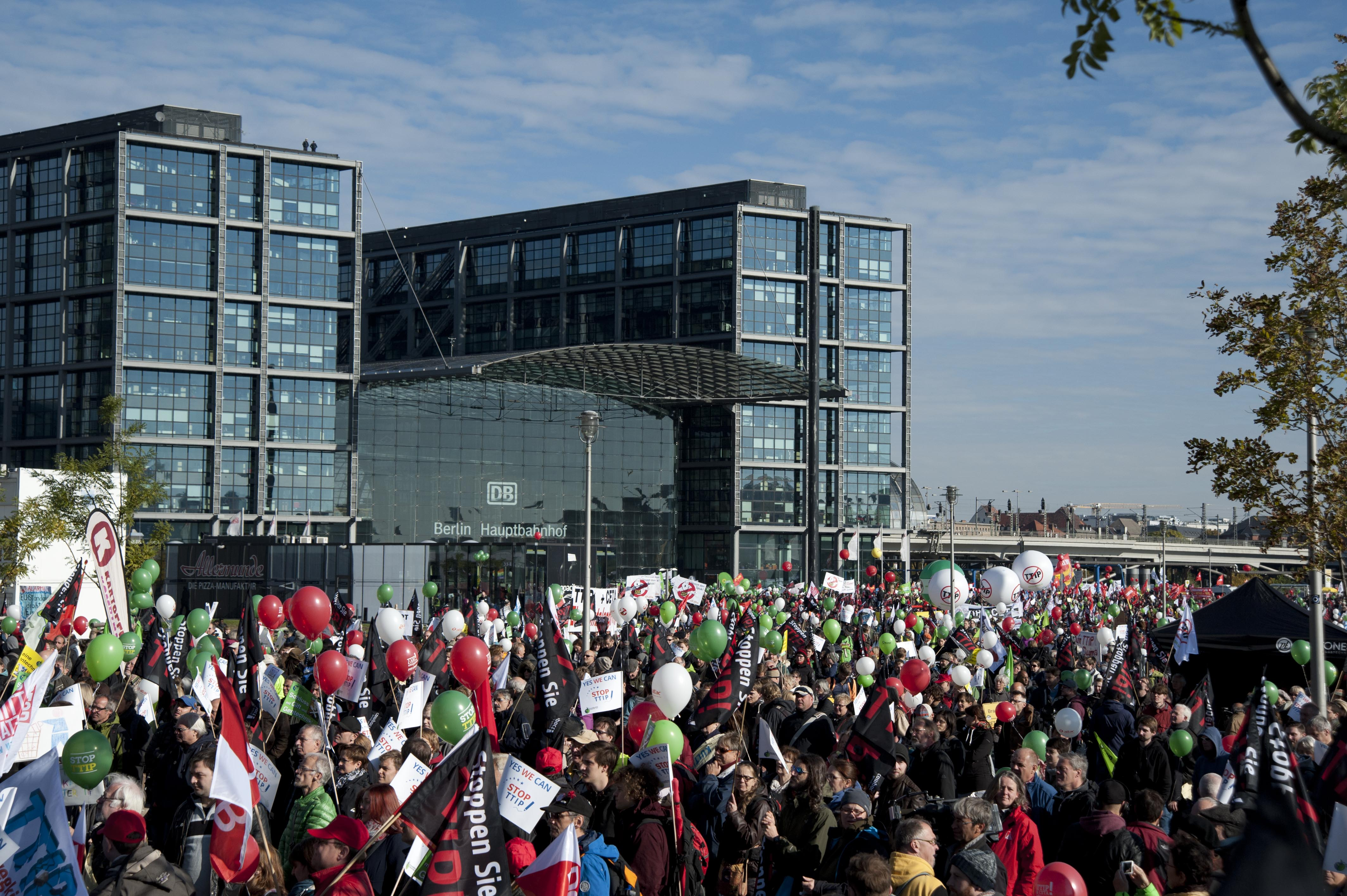 (Foto by Edda Dietrich) Unter dem Motto „TTIP & CETA stoppen! Für einen gerechten Welthandel“ haben am 10. Oktober 2015 etwa 250.000 Menschen bei einer Großdemonstration im Herzen von Berlin gegen die Freihandelsabkommen zwischen der EU und den USA (TTIP) sowie Kanada (CETA) protestiert. Auch in anderen EU-Staaten gab es Proteste - insgesamt gingen mehrere Millionen Europäer/innen auf die Straße gegen TTIP und CETA. Nie zuvor sind in Europa mehr Menschen zu diesem Thema auf die Straße gegangen. Zur Demonstration aufgerufen hatte ein breites zivilgesellschaftliches Bündnis